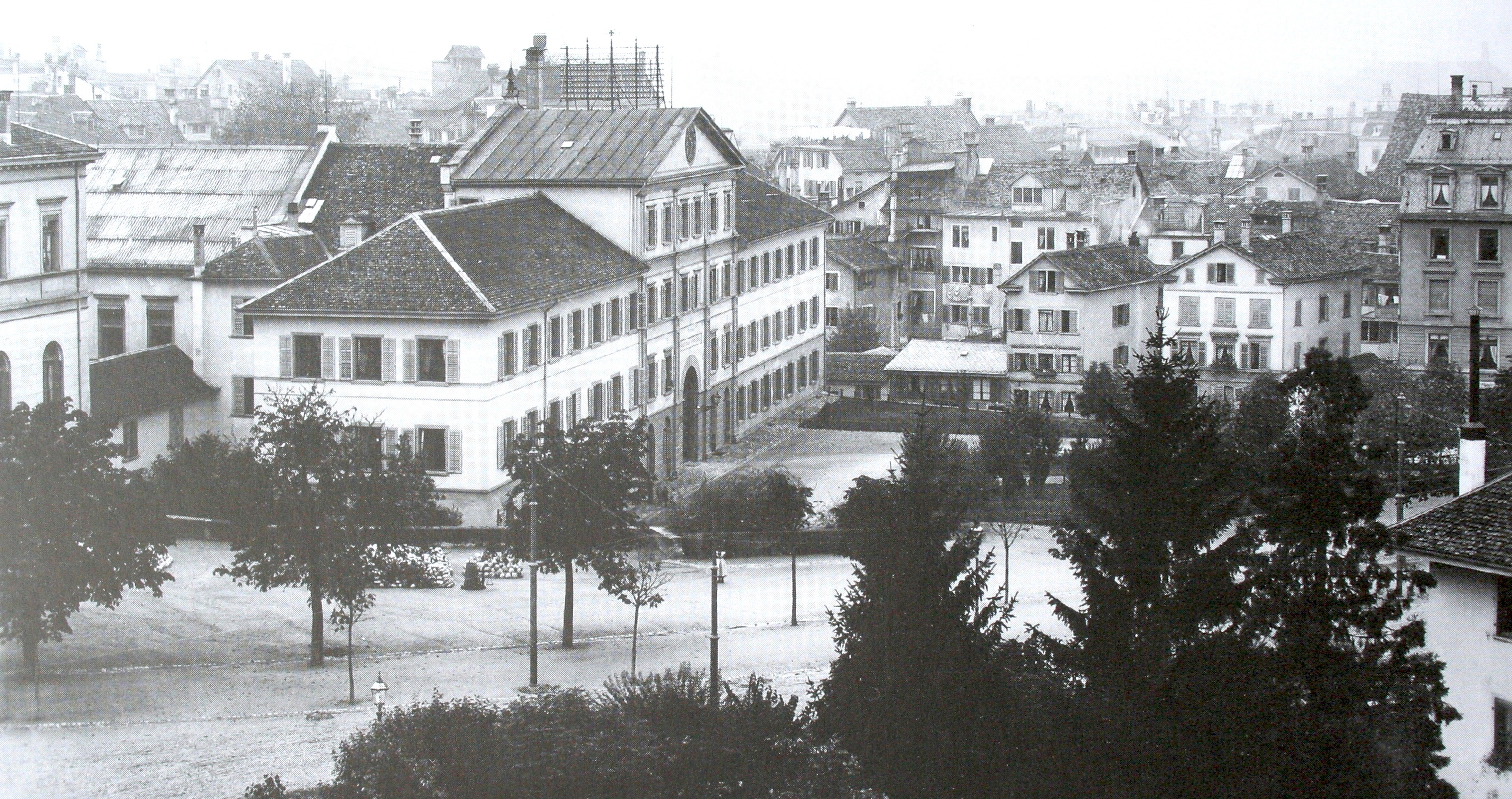 Ehemaliges Barfüsserkloster in Zürich: Längstrakt nach den Umbauten des 19. Jhd. Links das Casino. Foto von Hans Hofer, um 1900